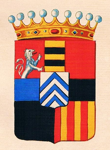 Wappen der Grafen von Breida (Braida), original altkolorierter Wappen-Kupferstich